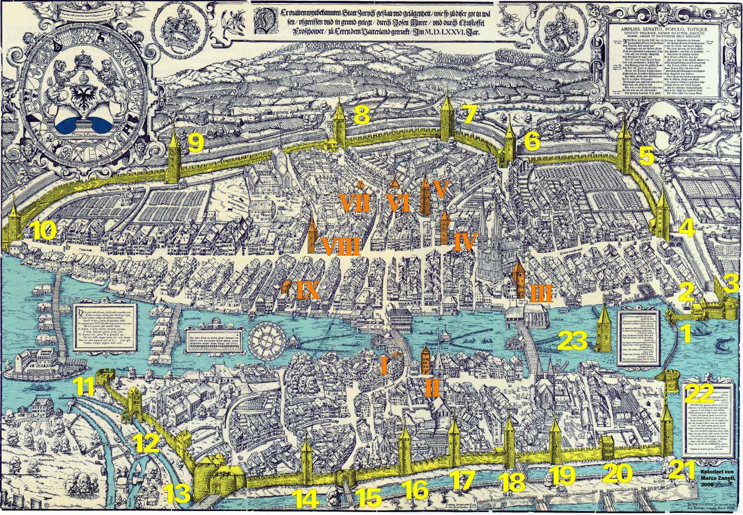 Kolorierte Version des Murerplans von Zürich von 1576, gelb die 2. Stadtbefestigung aus dem 13. Jahrhundert und orange die Adelstürme. Legende siehe Artikel Stadtbefestigung von Zürich